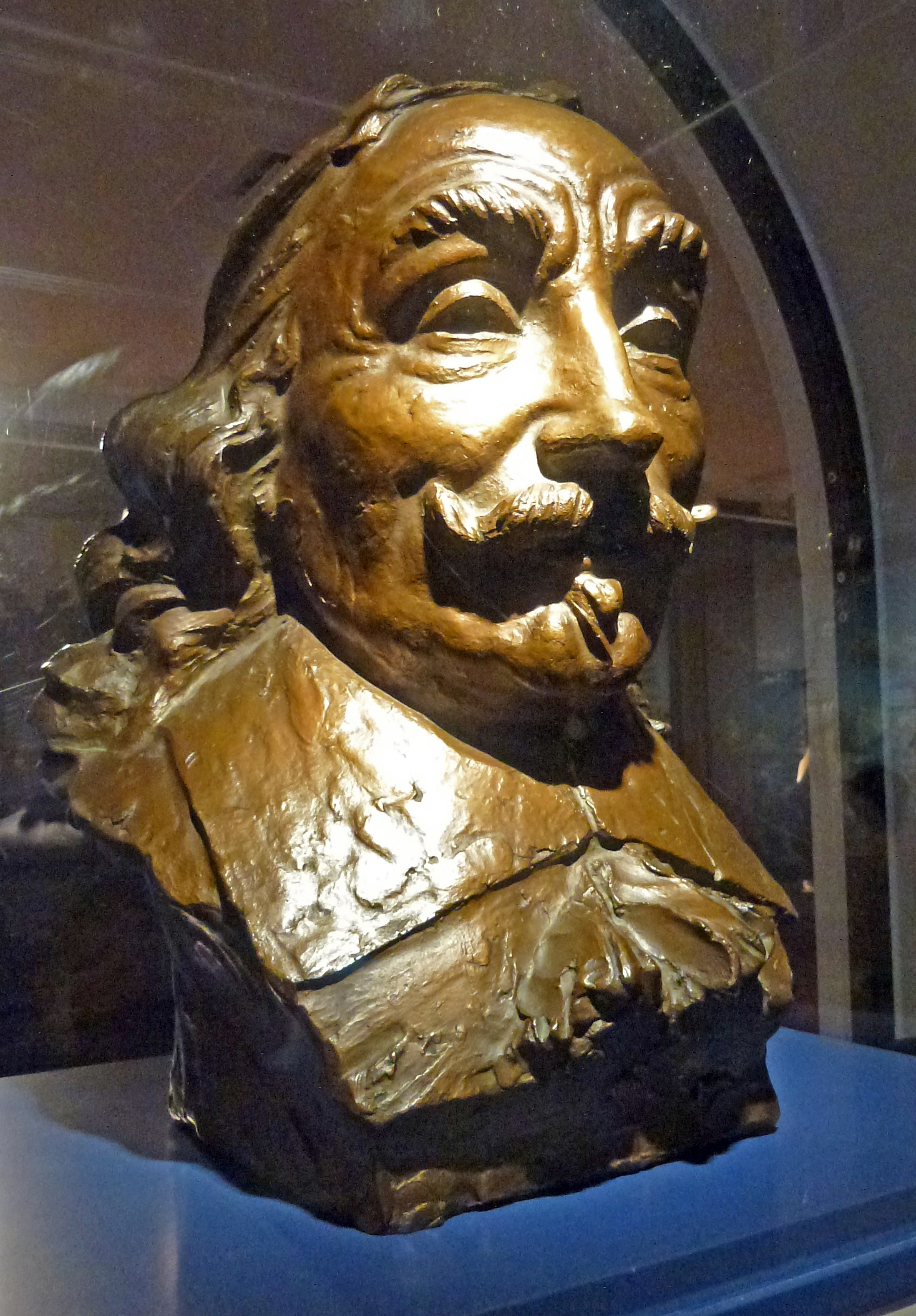 Bronzen buste van luitenant-admiraal Maarten Tromp in het Marinemuseum Den Helder